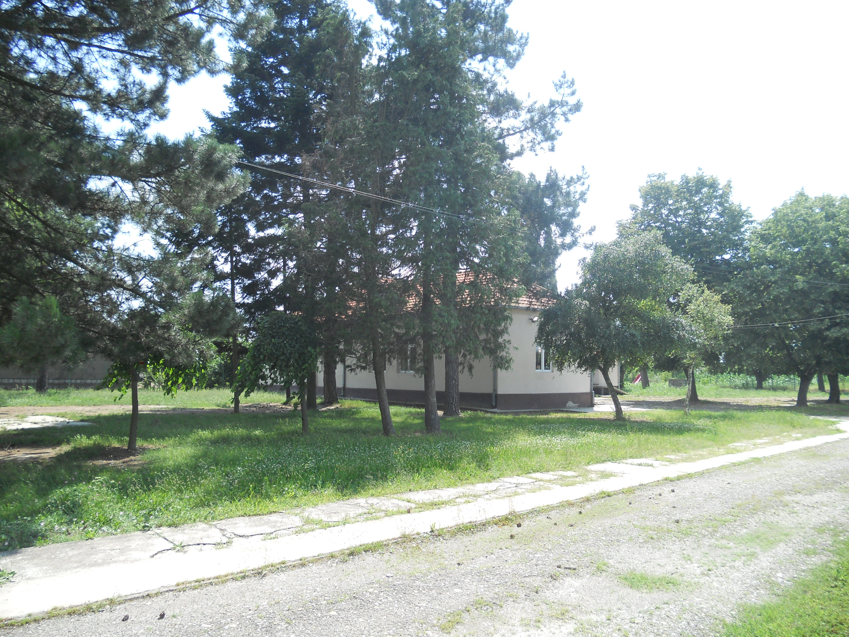 Jelenča, škola